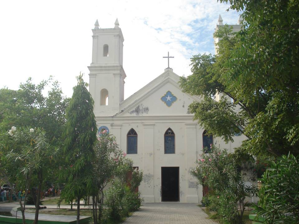 Manatuto